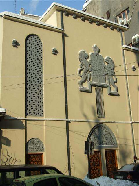 Sinagoga Ieşua Tova